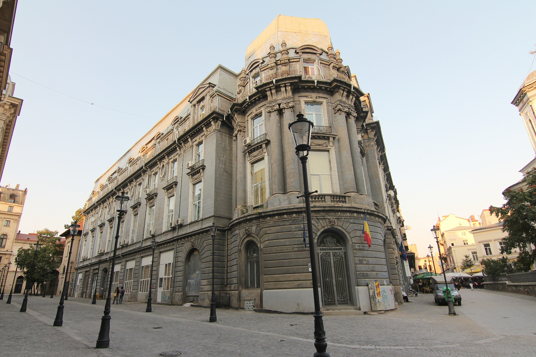 Spitalul P.T.T.R.